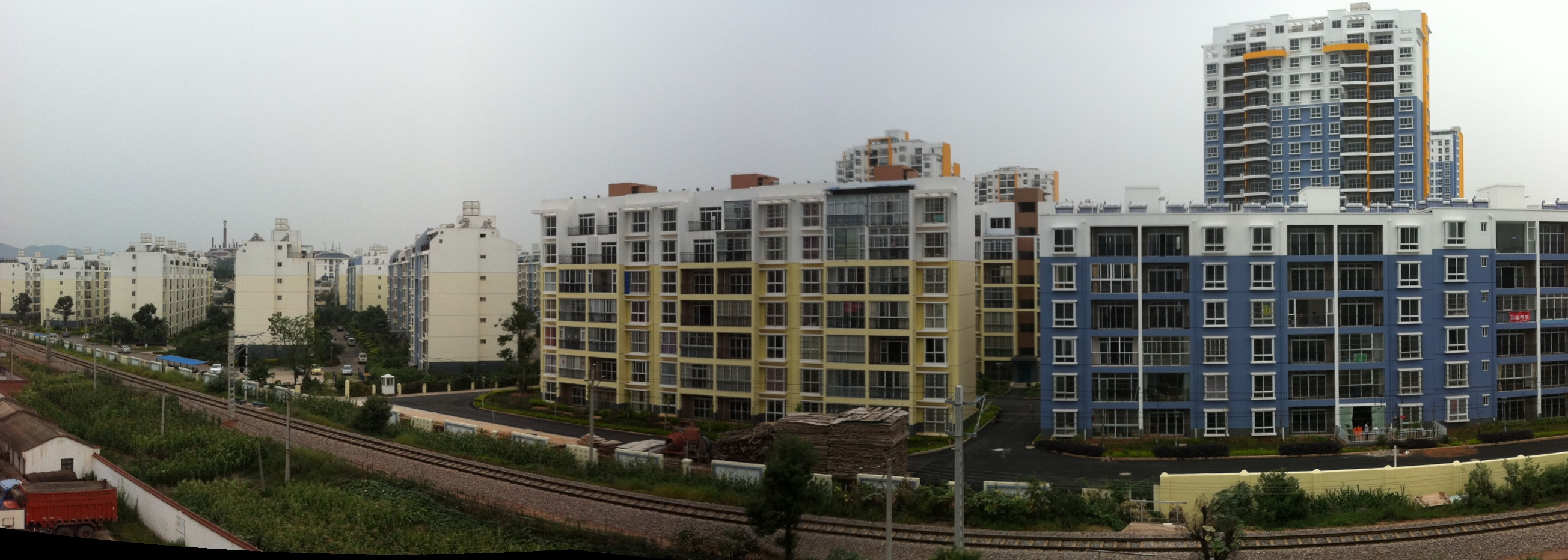 中文（中国大陆）: 一段经过楚雄市内的广大铁路